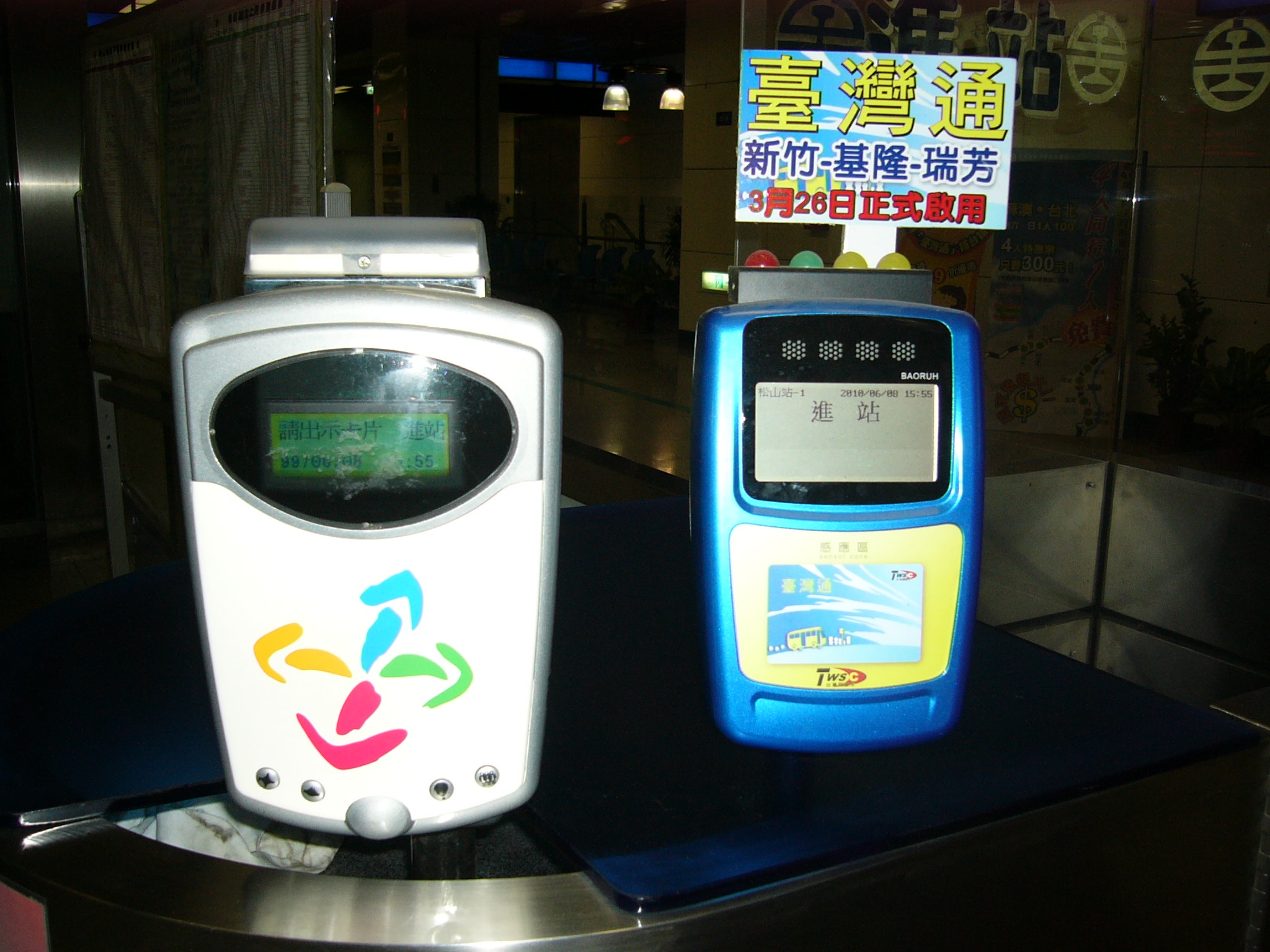 臺灣鐵路管理局松山車站剪票口設置的的悠遊卡驗票機（左）、臺灣通驗票機（右）。